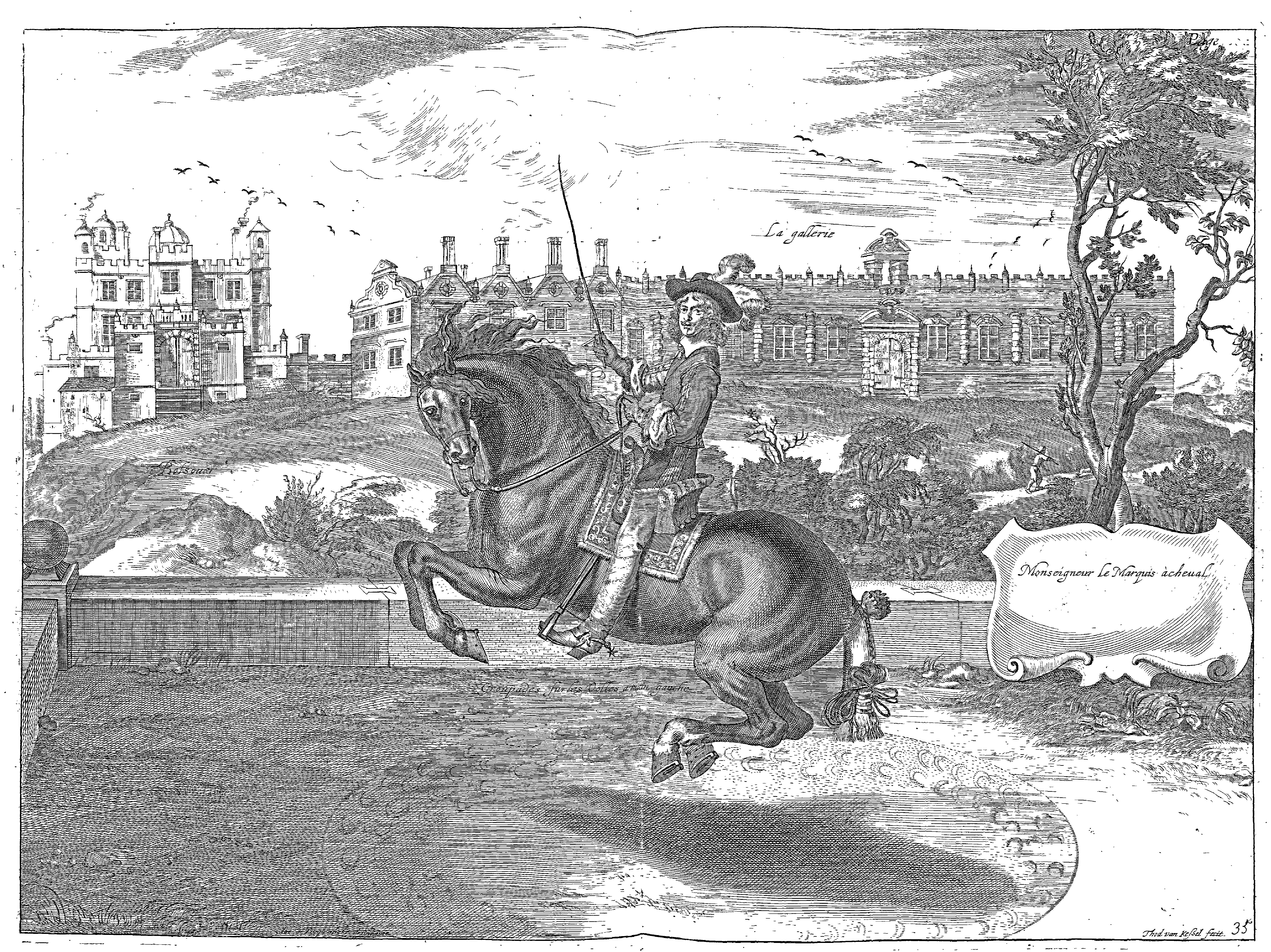 Illustrations from File:Cavendish - L’Art de dresser les chevaux, 1737.djvu